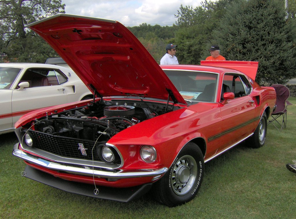 1969 Ford Mustang